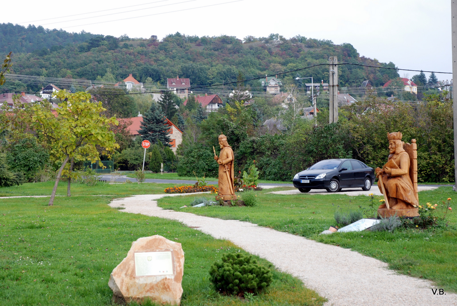 Скульптурная композиция. Дерево. Фото Виктора Белоусова.